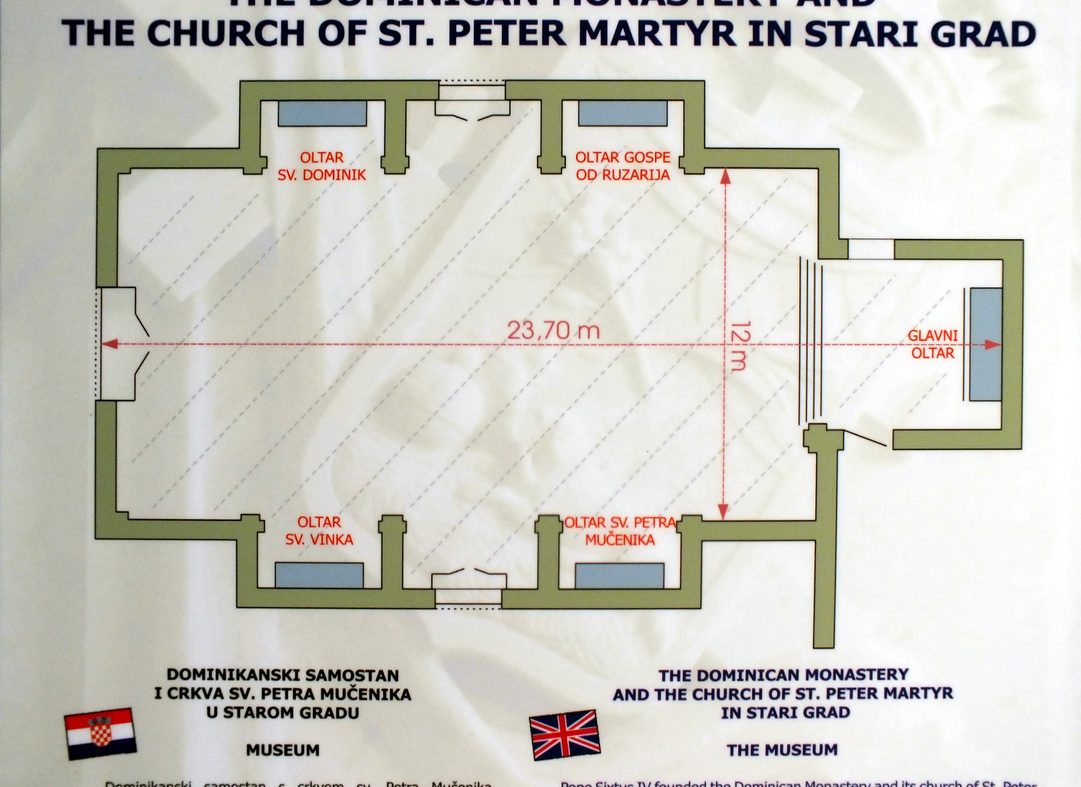 Stari Grad, Kirche St. Peter und Dominikanerkloster